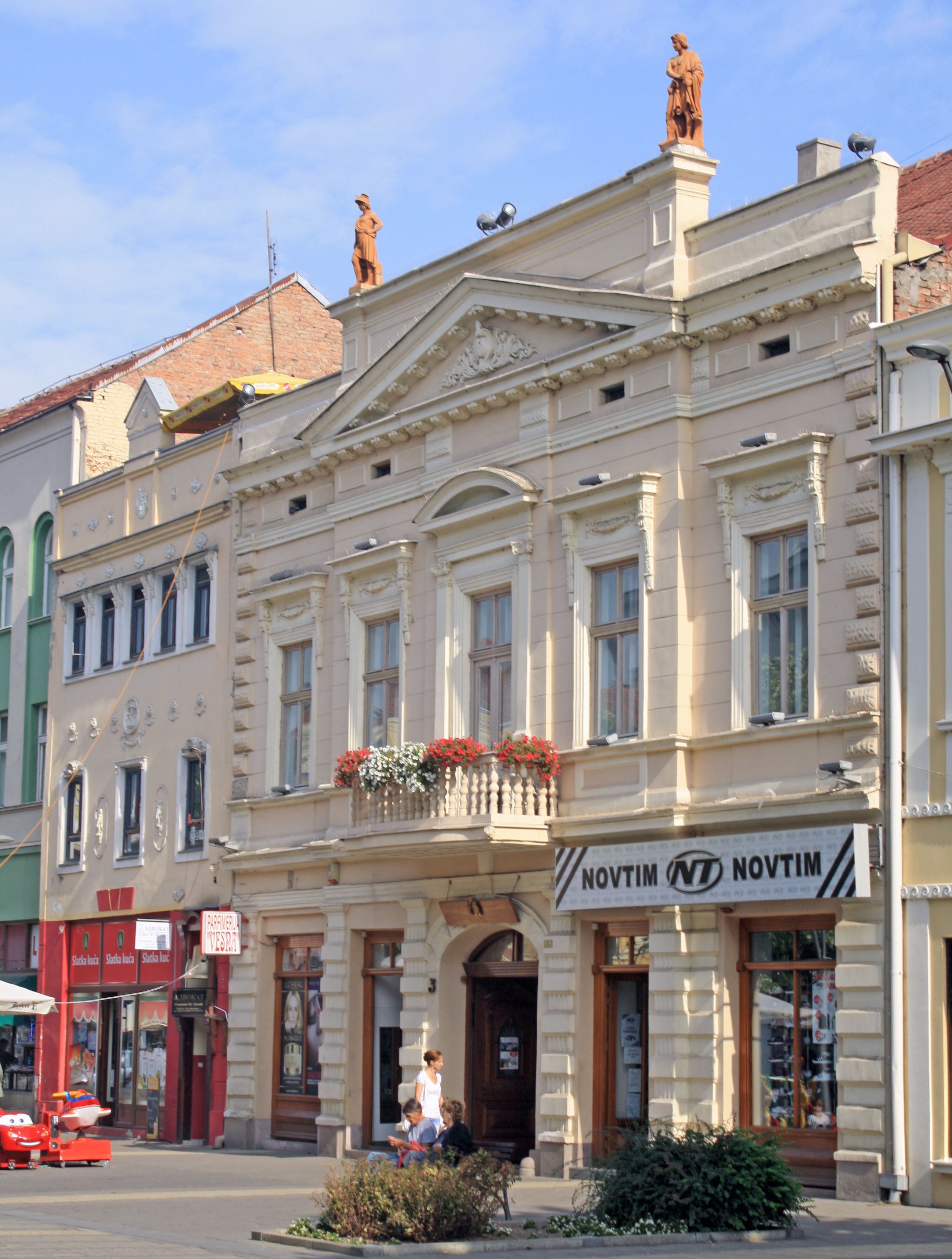 Арамбашића кућа у Шапцу, улица Карађорђева број 3.